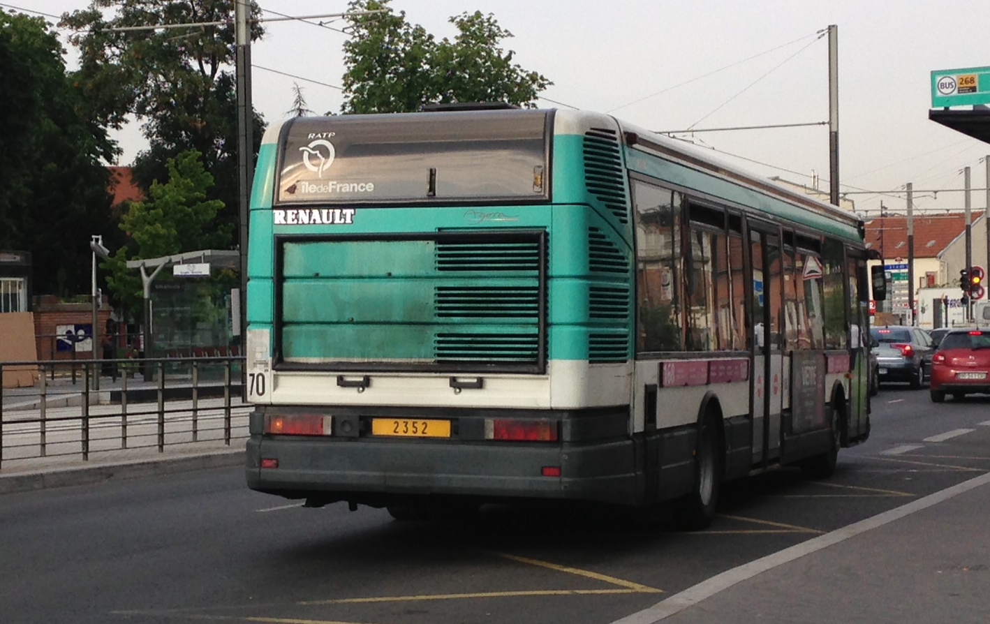 Le bus 168 de la RATP face à l’Hôtel de Ville de Pierrefitte en juillet 2013. En arrière-plan, le tracé de la ligne de tramway T5, qui remplace le bus 168.